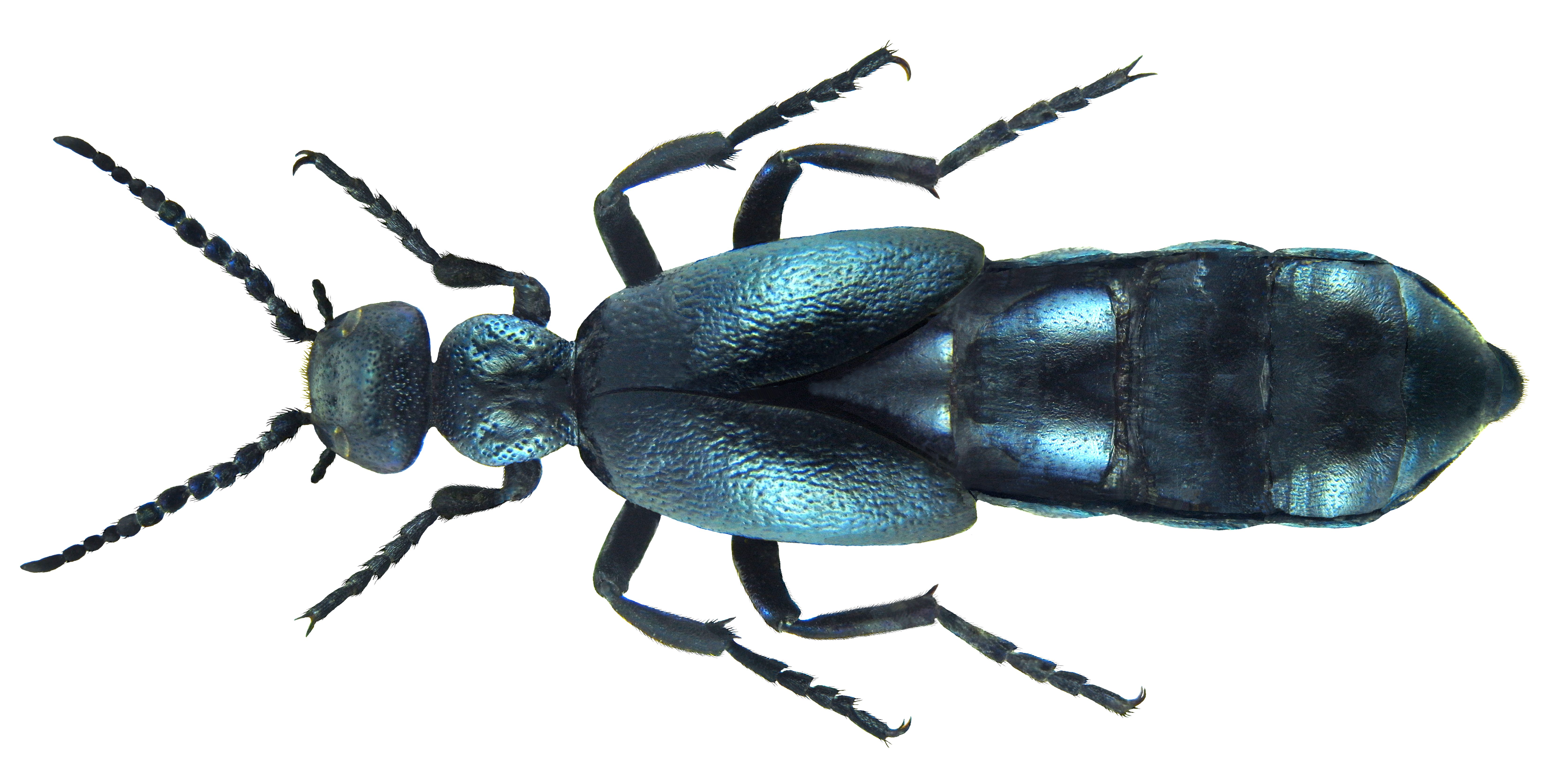 Meloe proscarabaeus Linné, 1758 Familie: Meloidae Groesse: 8-45 mm Verbreitung: Europa, Asien Fundort: Sardinien, Lola, 600 m leg. J.Scheuern, 23.IV.1992; det. J.Schönfeld, 2005 Foto: U.Schmidt, 2005